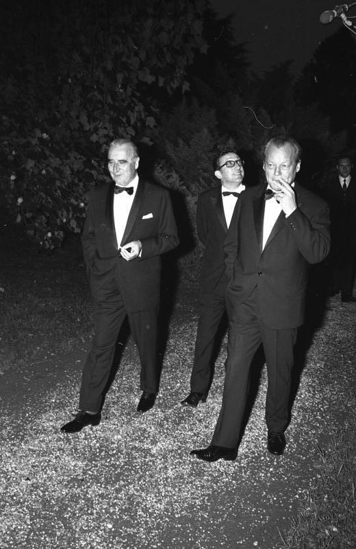 Brandt gibt Abendessen für Pompidou auf Schloß Gymnich